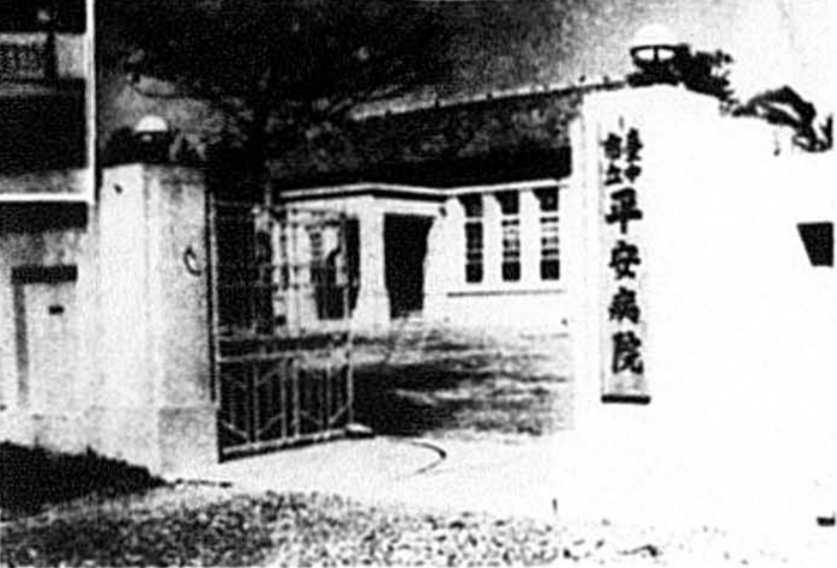 日治時期台中市的傳染病院，位於台中市後壠子半平厝